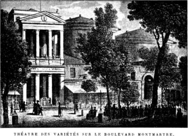 The Théâtre des Variétés in Paris, France, 1800s